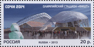 XXII Олимпийские зимние игры 2014 года в г. Сочи. Олимпийские спортивные объекты